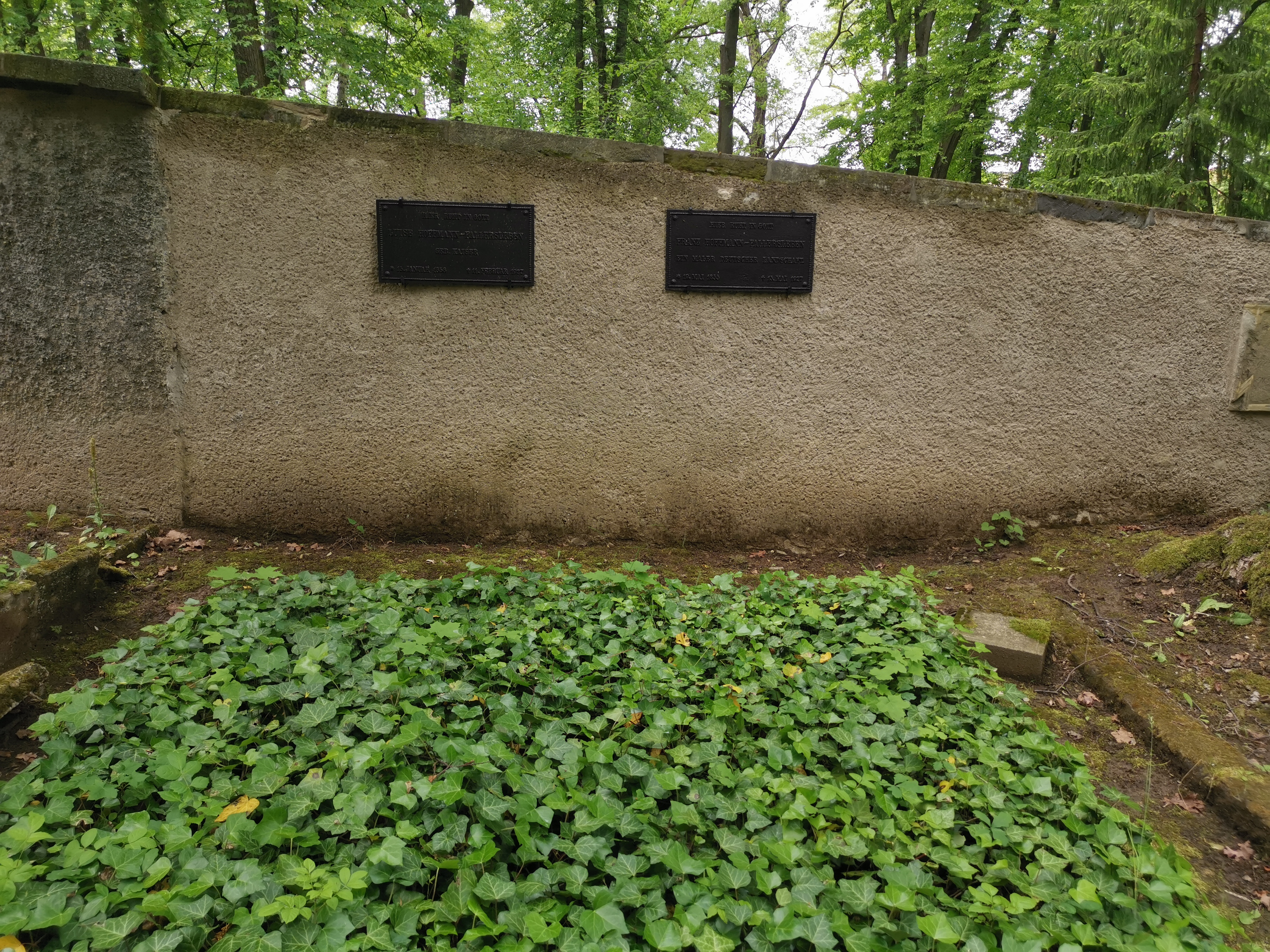 Grabstätte Franz Hoffmann-Fallersleben; Historischer Friedhof Weimar